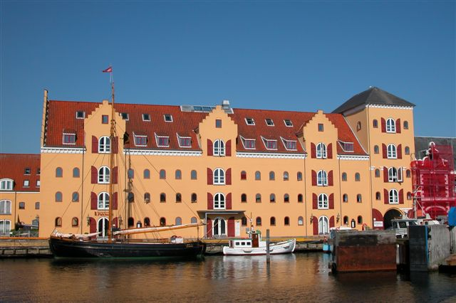 Svendborg havn